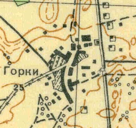 Топографическая карта Ленинградской области, квадрат О-35-11-Г-г (Муховицы), деревня Горки.